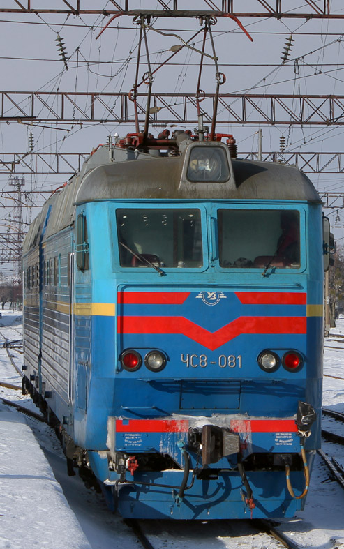 IMG_1422Электровоз ЧС8-081 (ТЧ-1 Киев-Пассажирский), 12.01.2013. Украина, Винницкая область, станция Жмеринка.jpg